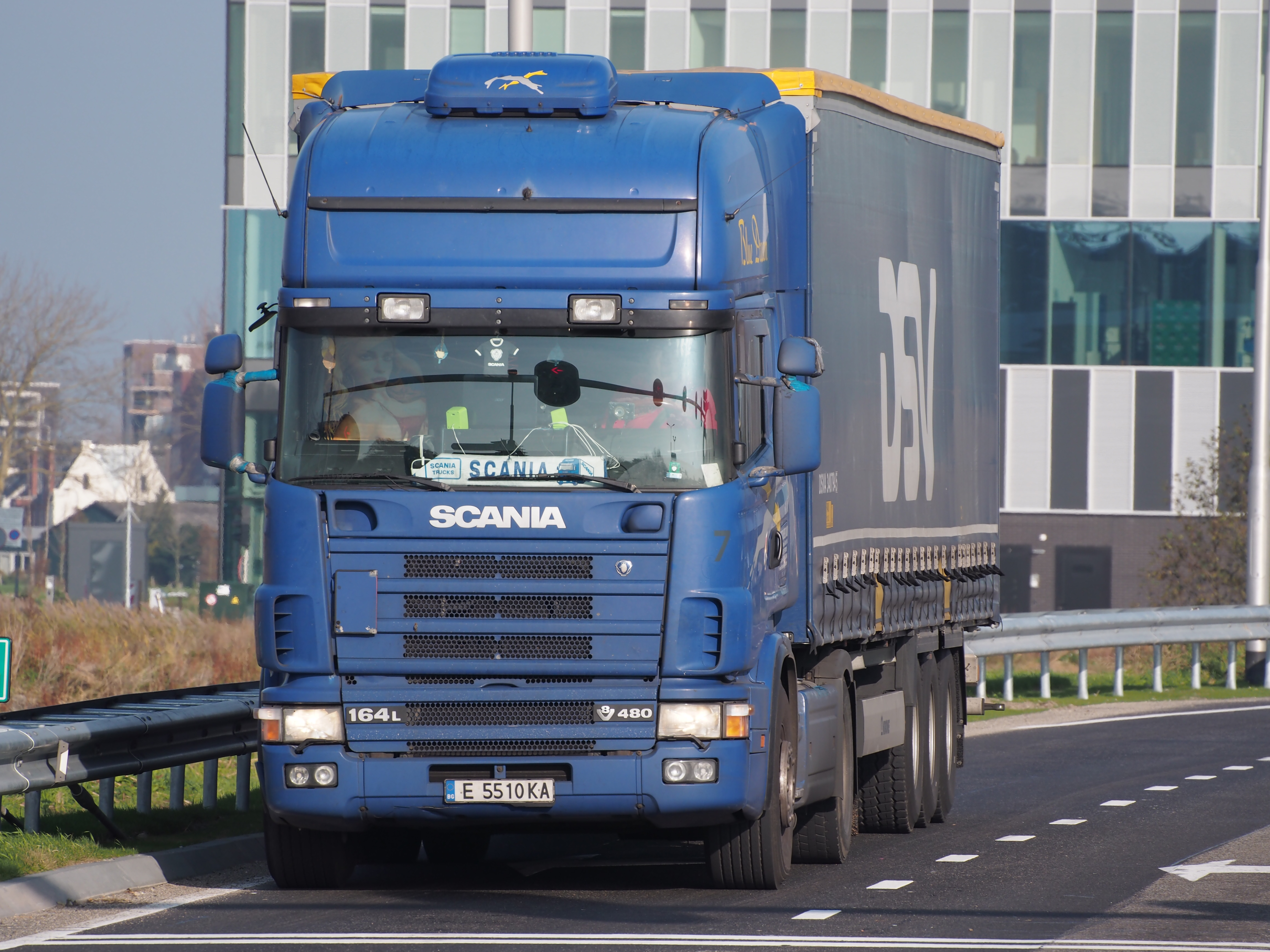 SCANIA 164L 480 truck at Leiden.